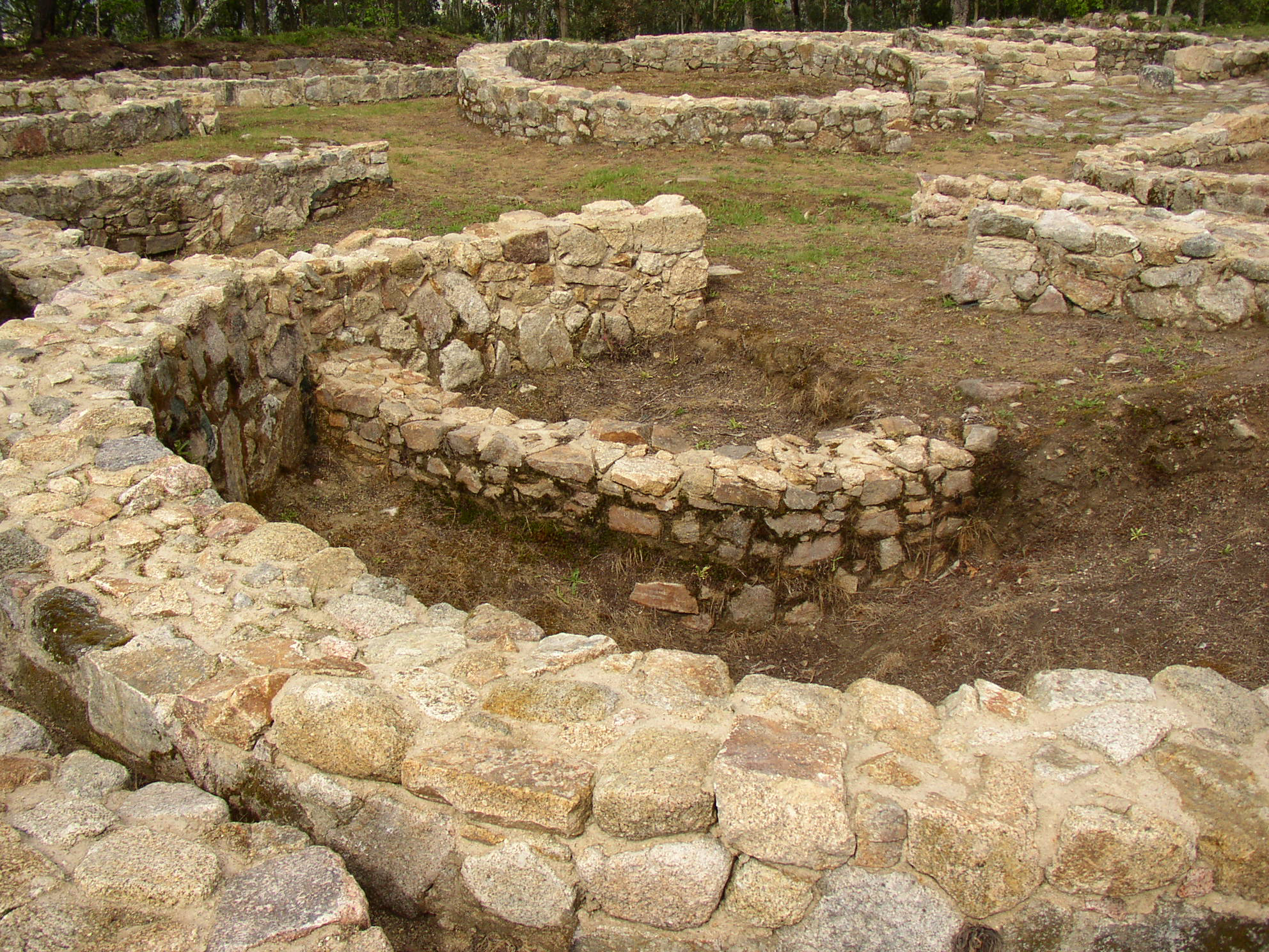 Cividade de Terroso This file was uploaded for Wiki Loves Monuments in Portugal with the unique identifier 74301.